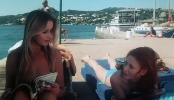 Screenshot del film Peccati di gioventù di Silvio Amadio (1975)